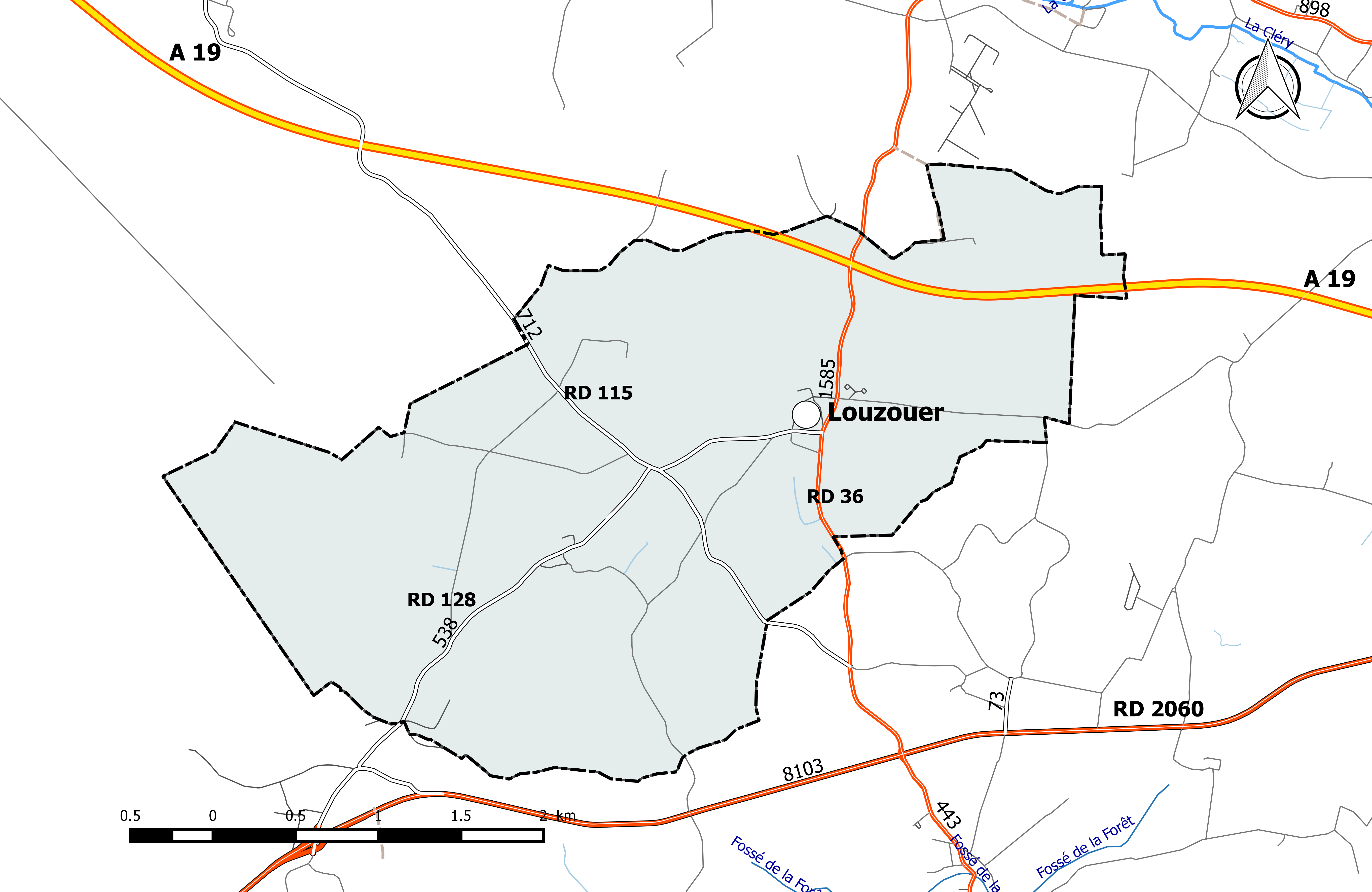 Carte du réseau routier de la commune de Louzouer.